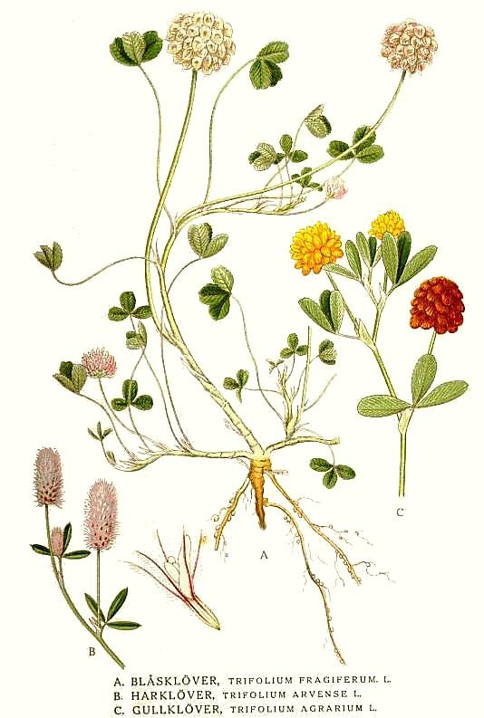 A. Trifolium fragiferum L. B. Trifolium arvense L. C. Trifolium aureum Pollich, syn. Trifolium agrarium L. Original Description A. Blåsklöver, Trifolium fragiferum L. B. Harklöver, Trifolium arvense L. C. Gullklöver, Trifolium agrarium L.